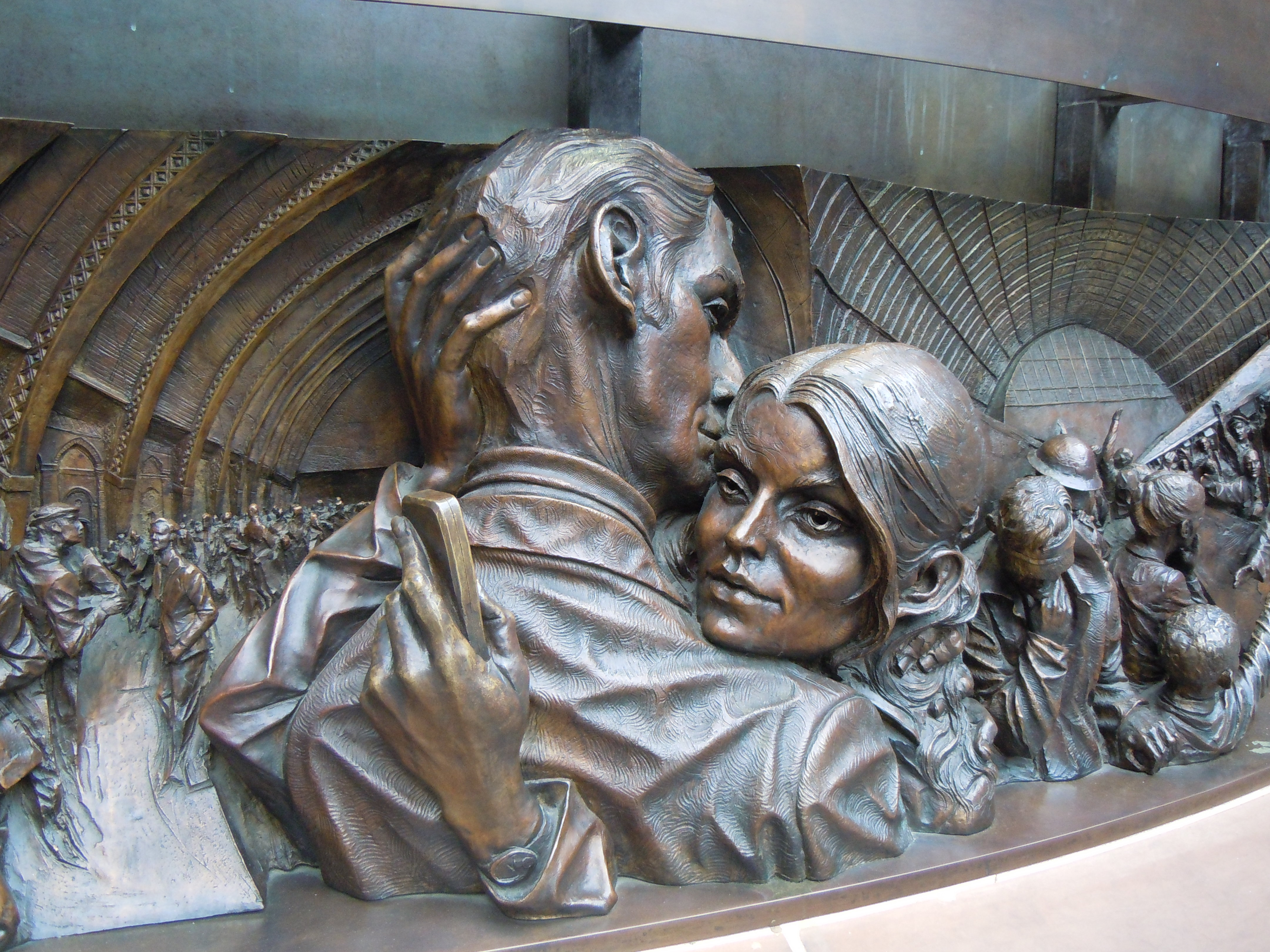 The meeting place - Paul-Day- gare St-Pancras - Londres - Détail du bas-relief